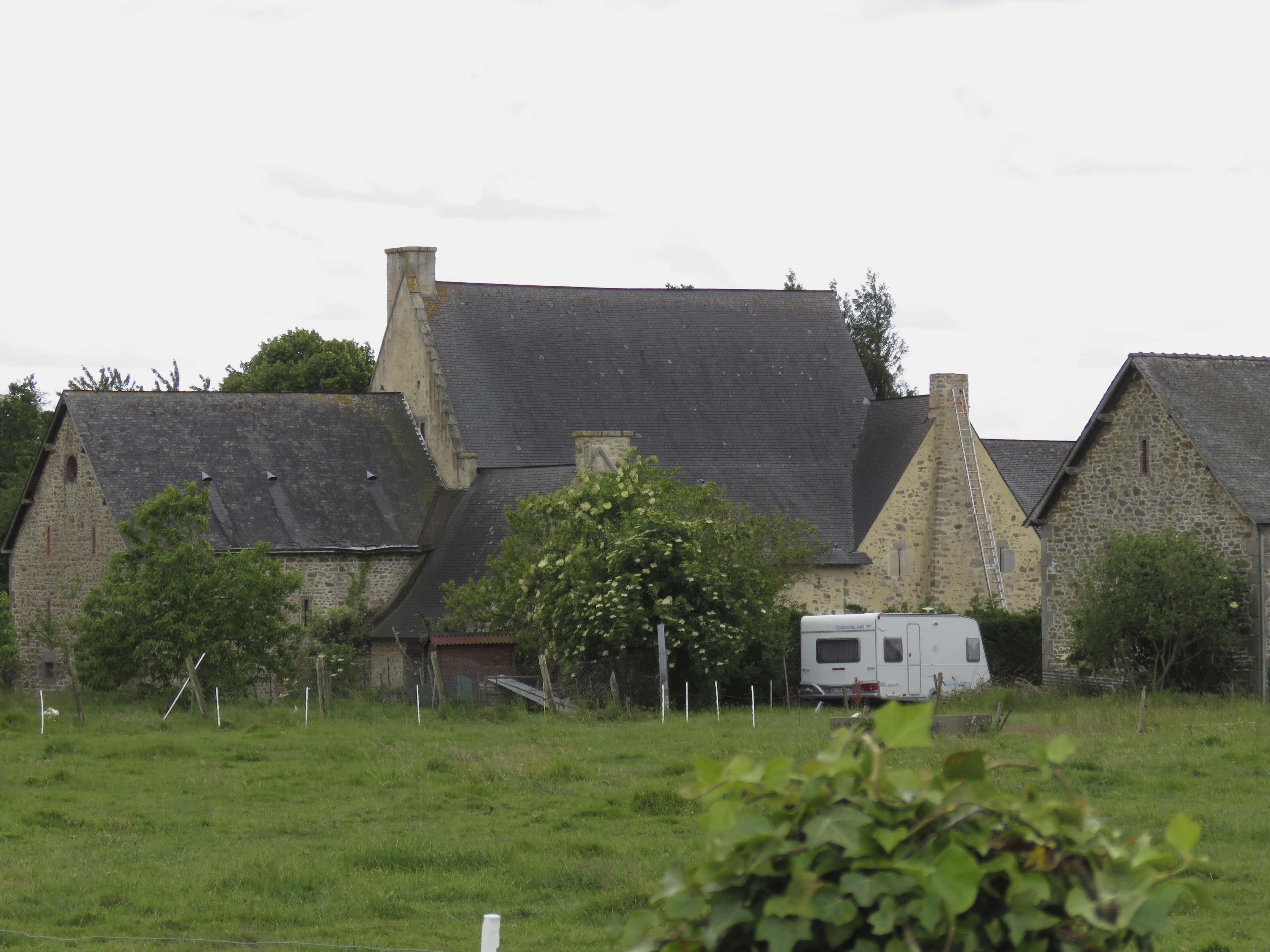 Vue extérieur du nord du logis.